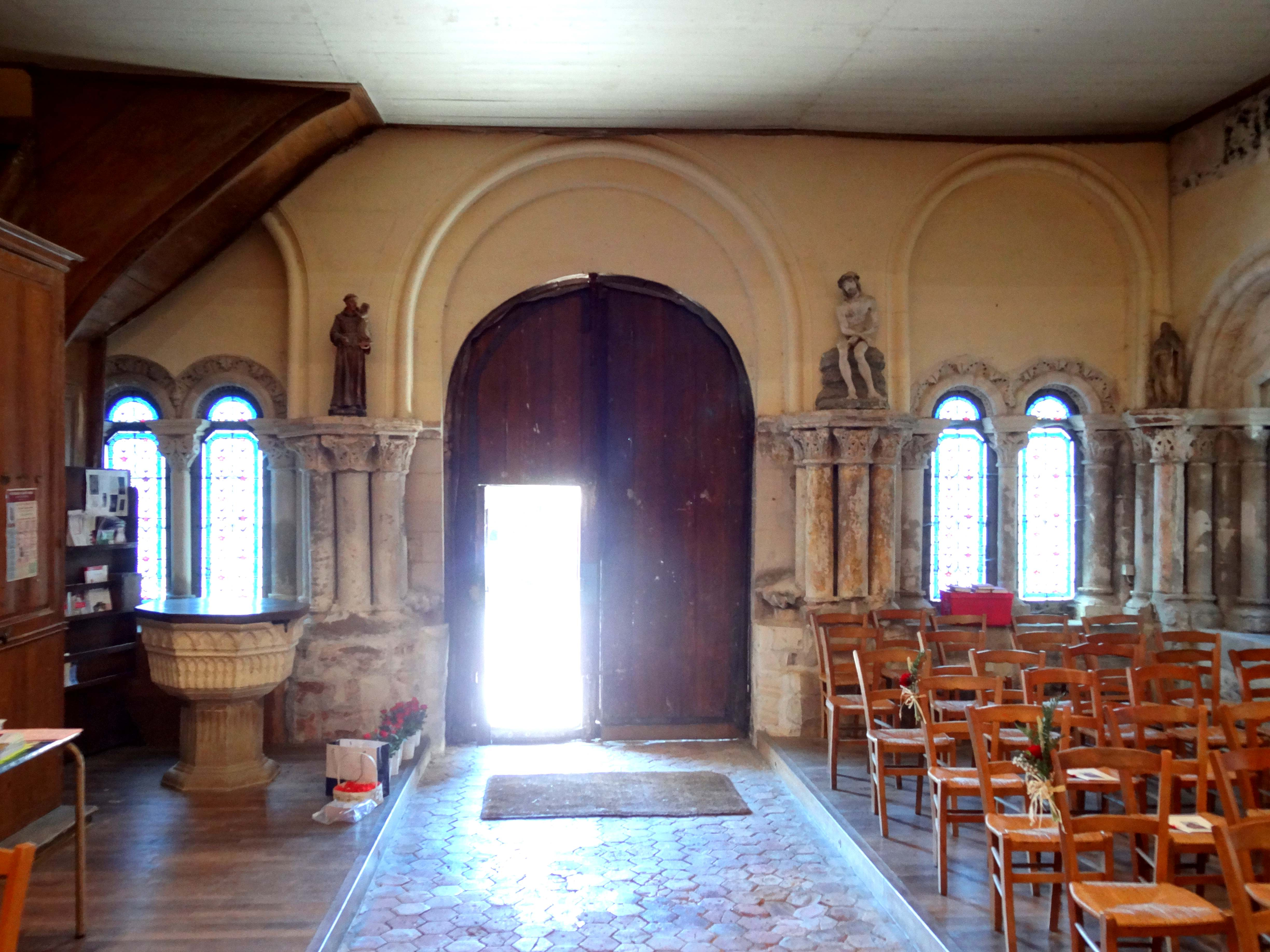 Intérieur de l'église - voir titre.